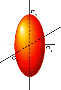 Kvadrupól